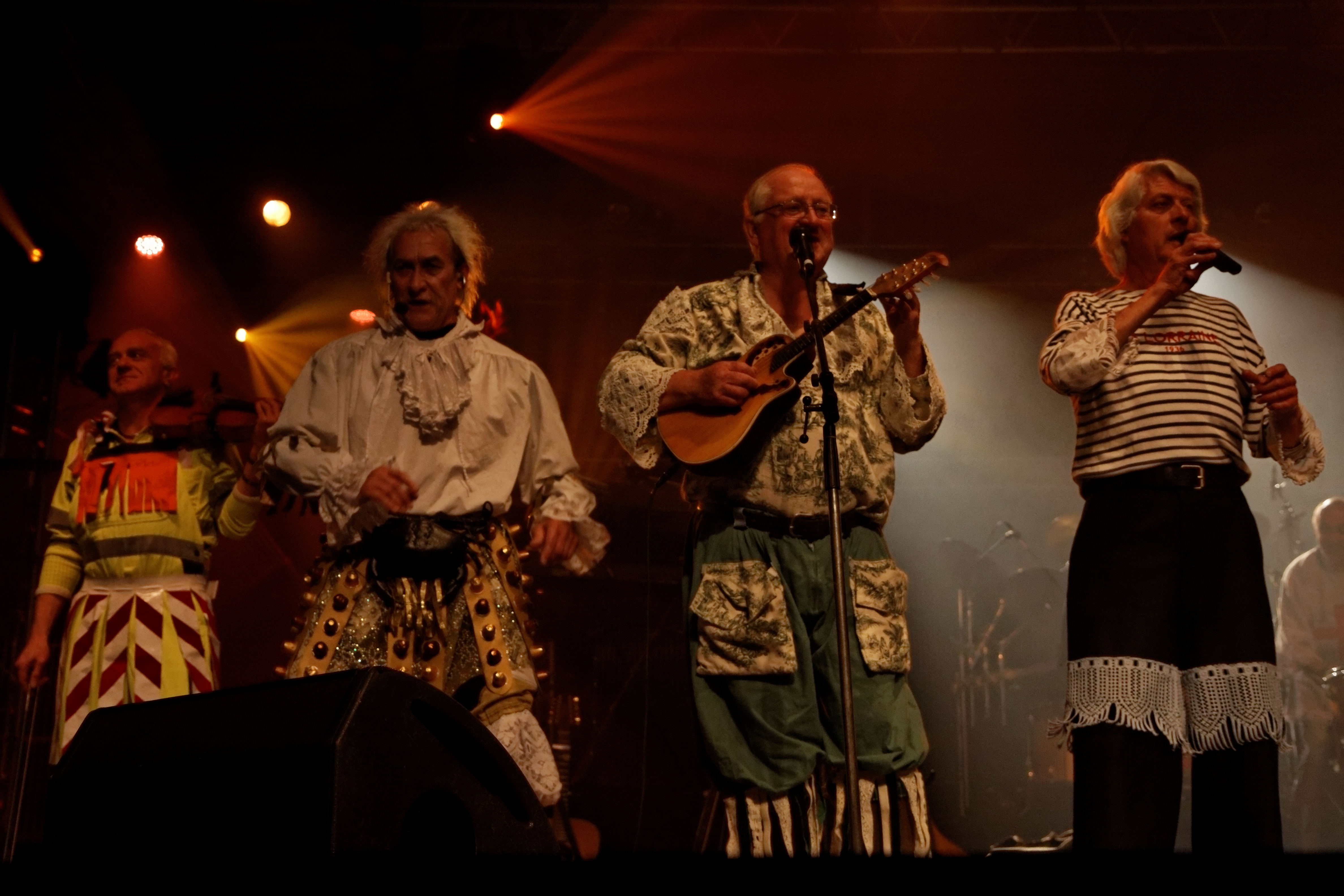 Tri Yann en concert à l'espace Gradlon lors du festival de Cornouaille 2012.